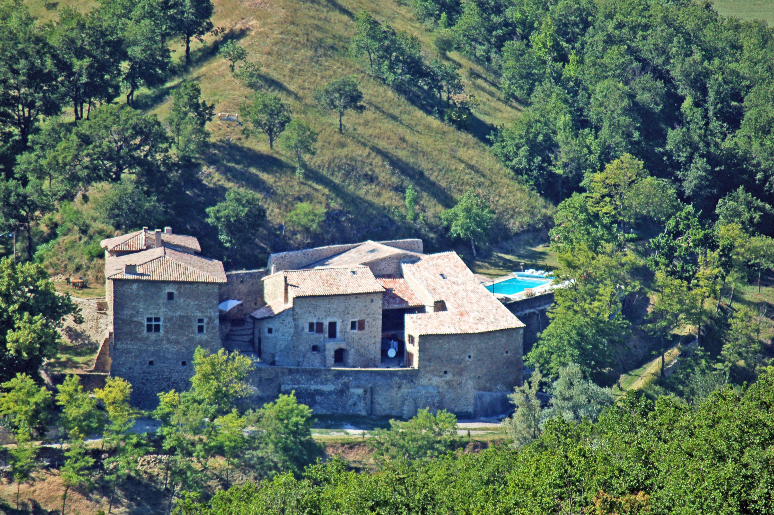 Chateau Le Combet à la Répara-Auriples